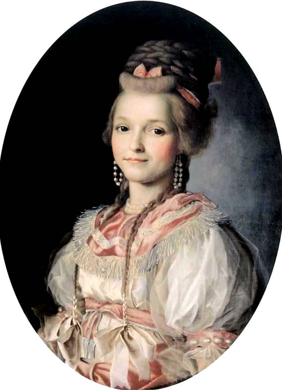 Портрет балерины Татьяны Васильевны Шлыковой-Гранатовой.